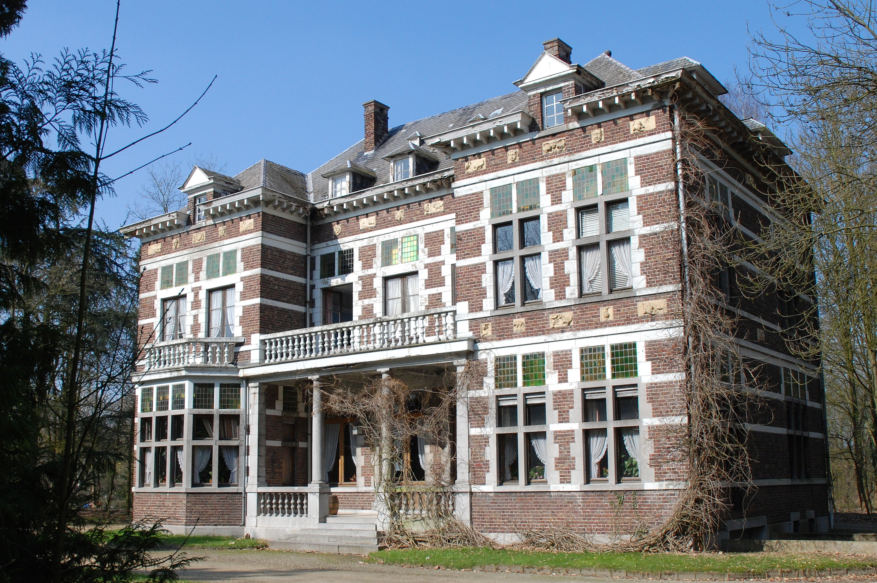 De woning van de voormalige directeur van de steenkoolmijn van Zwartberg, België